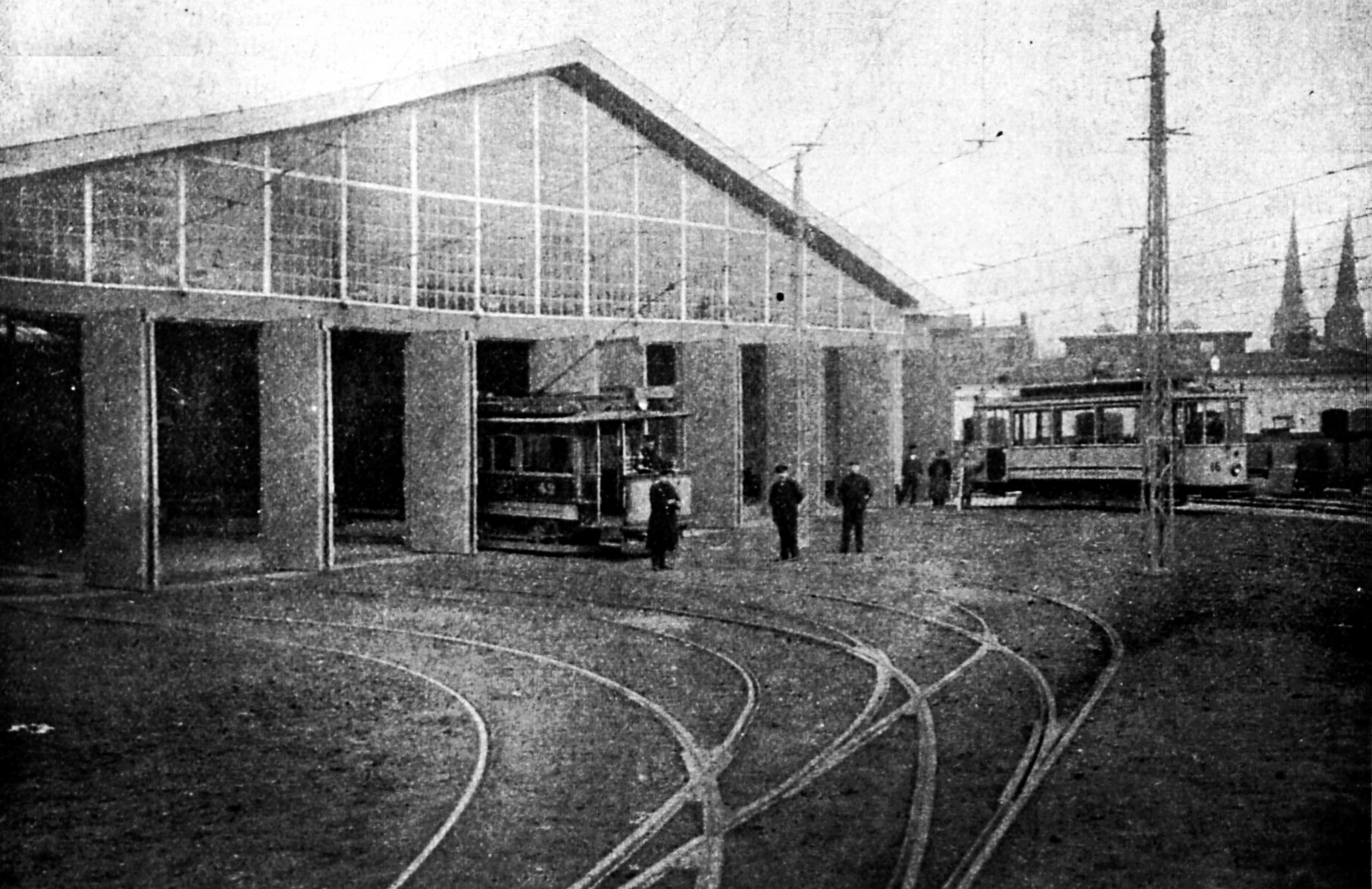 Außenansicht der zusätzlichen Wagenhalle in der Finkenstraße